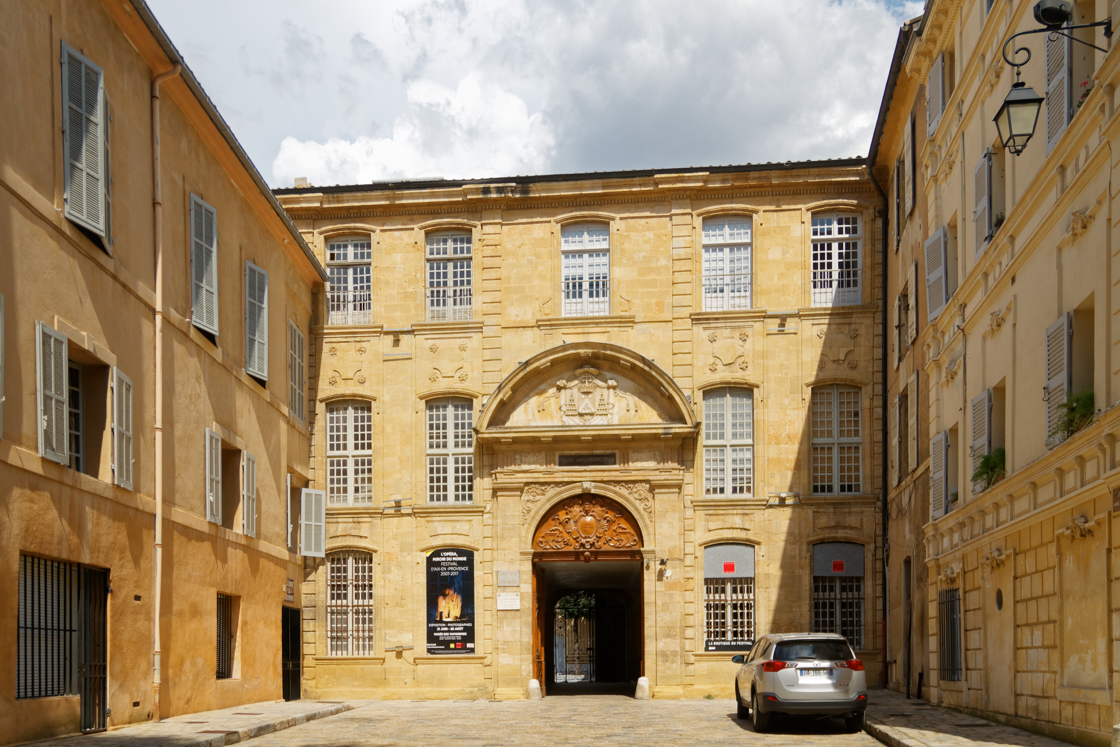 Erzbischöfliches Palais in Aix-en-Provence, Hauptfassade